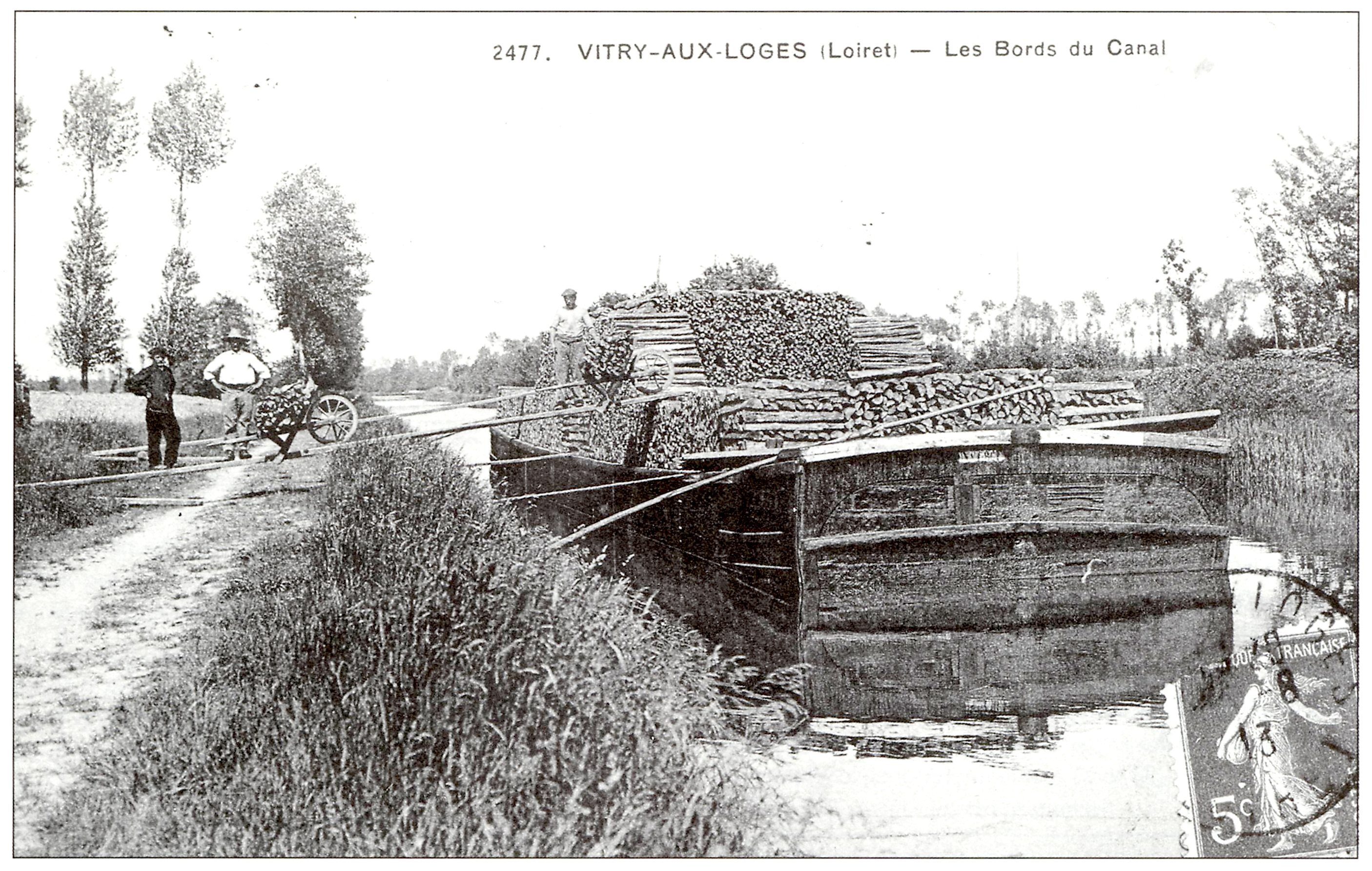 Batard nivernais. Embarcation évoluant sur le canal d'Orléans au début du XXe siècle.